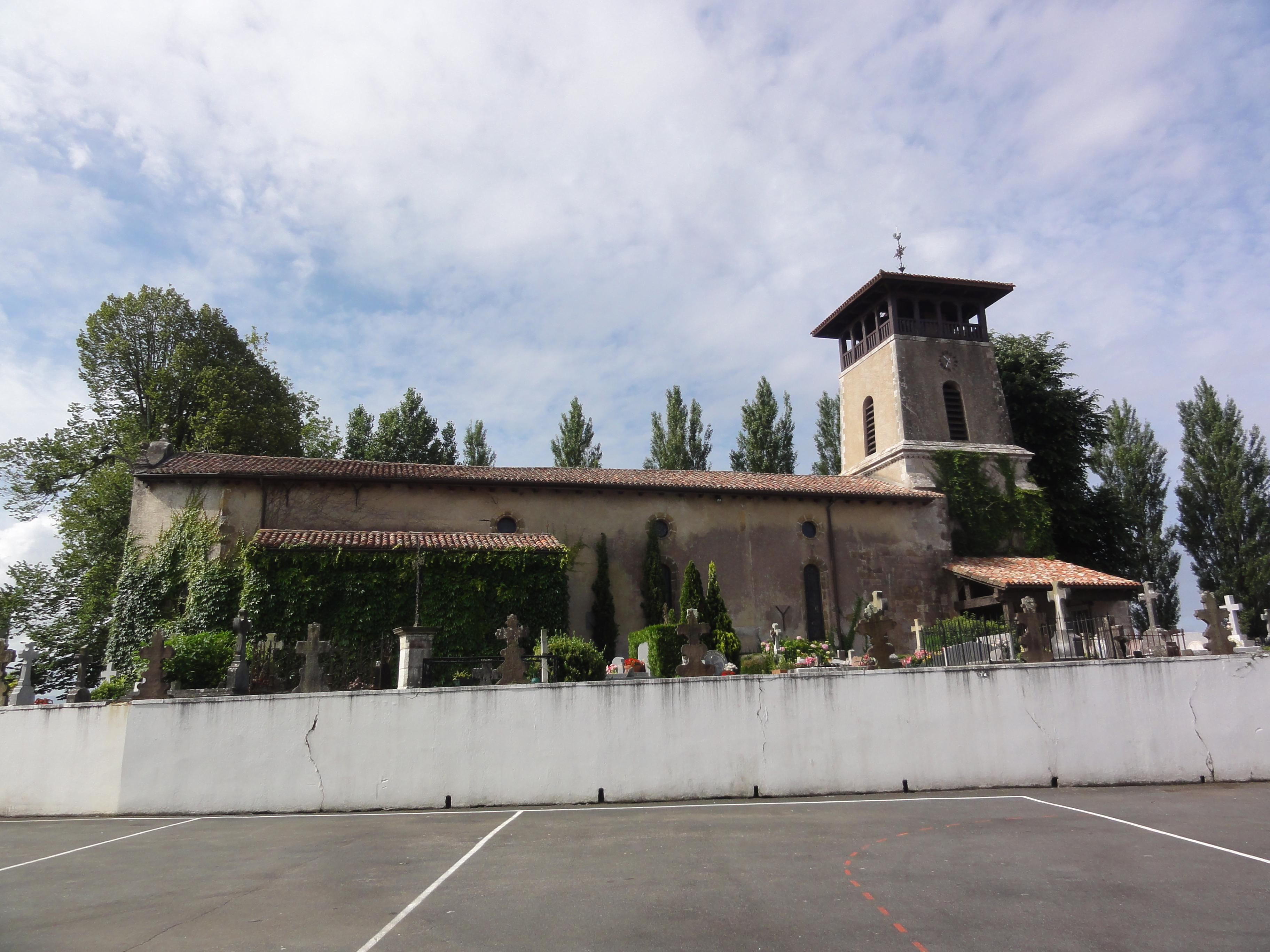 Arcangues, Église.